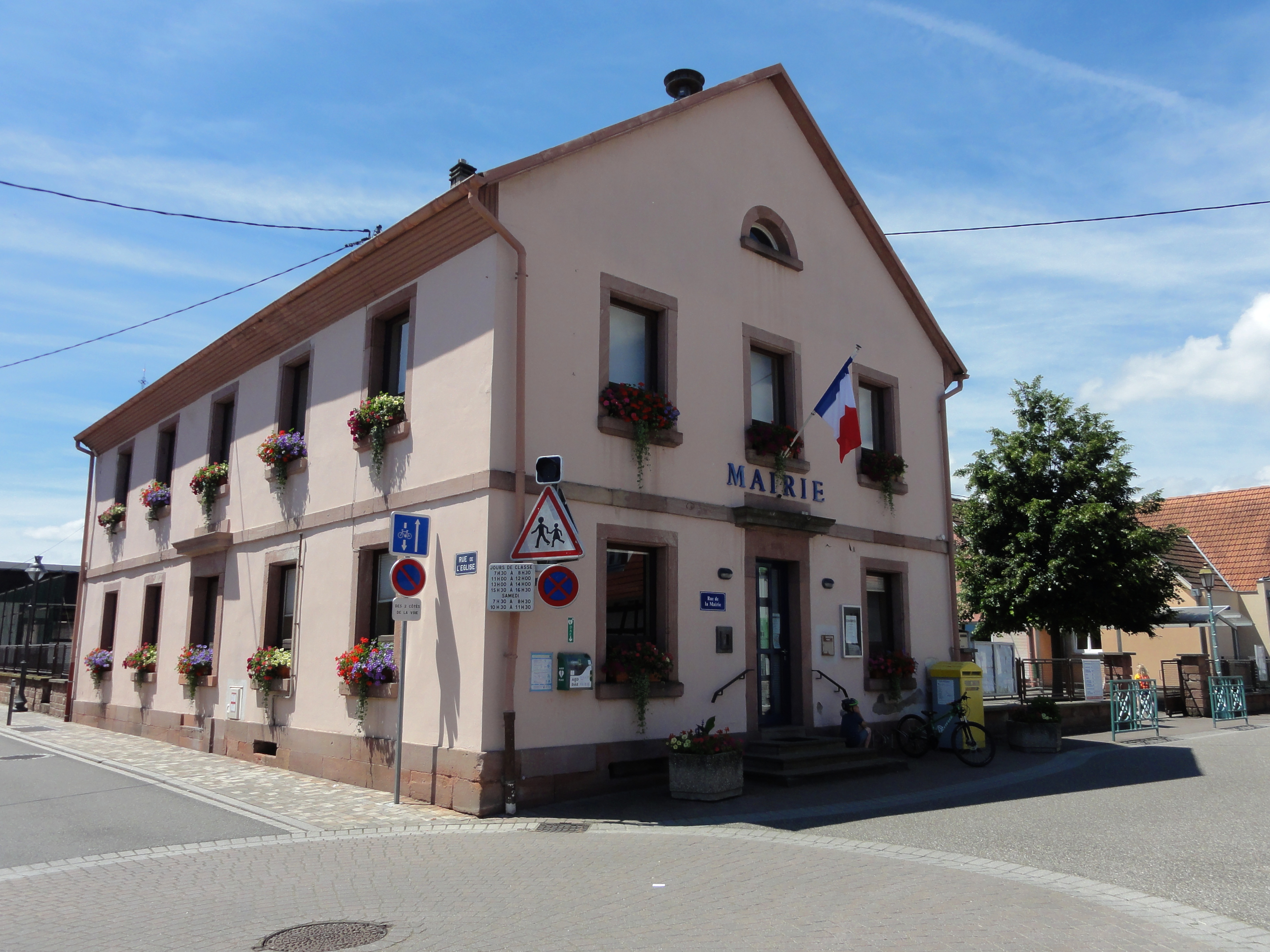 Alsace, Bas-Rhin, Mothern, Mairie (1830), 19 rue de la Mairie. .